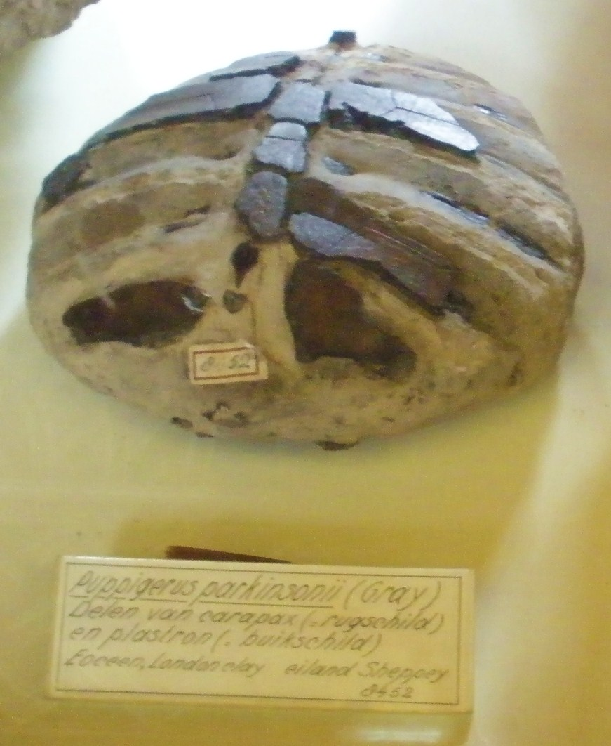 Fossil of Puppigerus camperi (syn. Puppigerus parkinsonii), an extinct turtle - Took the photo at Teylers Museum, Haarlem